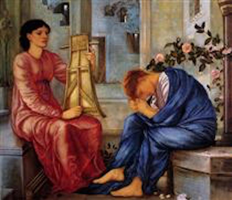 Droite, jeune homme mélancolique ; gauche, jeune femme à la lyre.